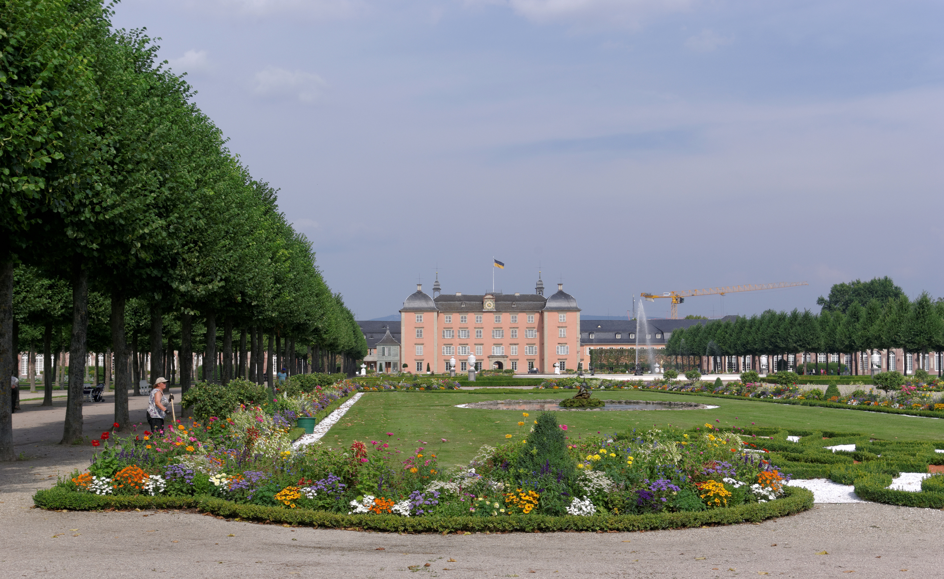 Schwetzingen, Schloß